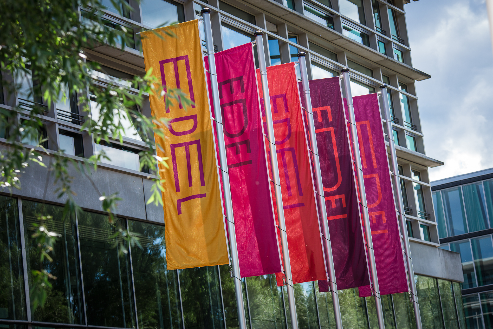 Firmensitz in Hamburg-Altona, Eingangsseite